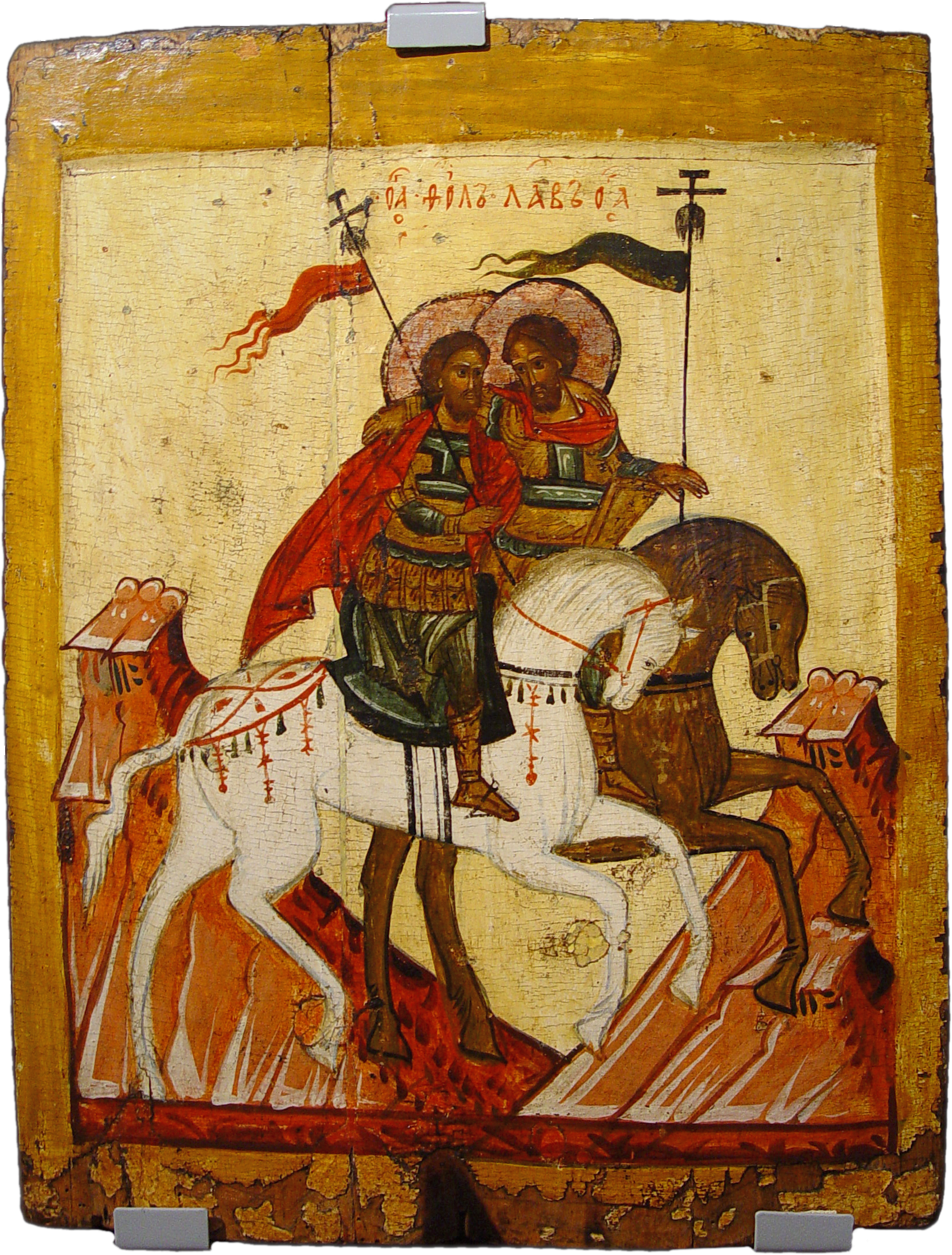 Святые Флор и Лавр; Россия. Великий Новгород; XVI в.; местонахождение: Россия. Москва. Собрание С. Н. Воробьева.; 39.6 x 53.3 см.; материал: дерево, пигменты натуральные; техника: темпера яичная